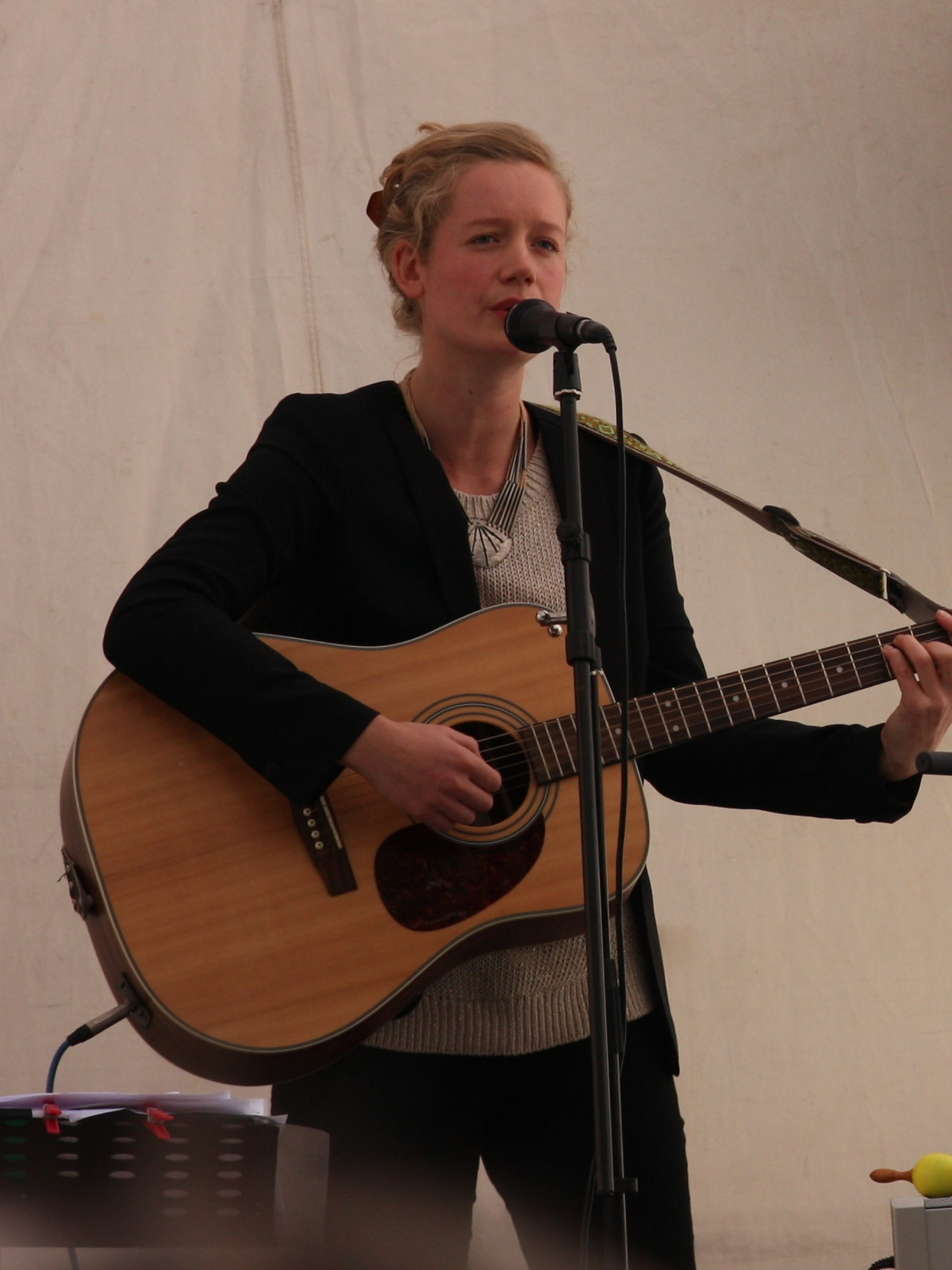 Wiesbadener Stadtfest 2013: Katja Aujesky (ehemals 200 Sachen)